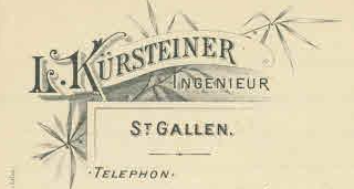 Briefkopf von Louis Kürsteiner, Ingenieur, St.Gallen, 1896